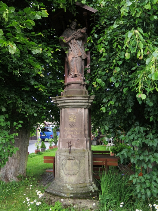 Socha svatého Jana Nepomuckého, při čp. 148, Roprachtice.